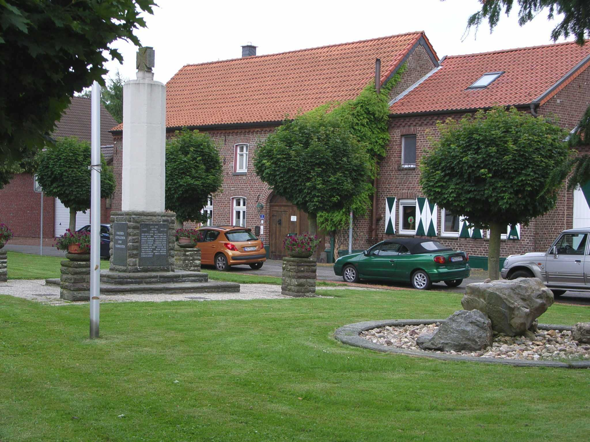 War memorial Golkrath (Erkelenz)